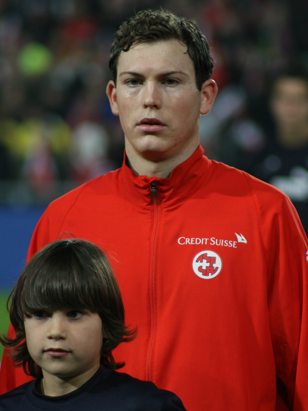 Stefan Lichtsteiner, St. Jakob Stadion, Basel (Switzerland), Switzerland - Brasil 1:2